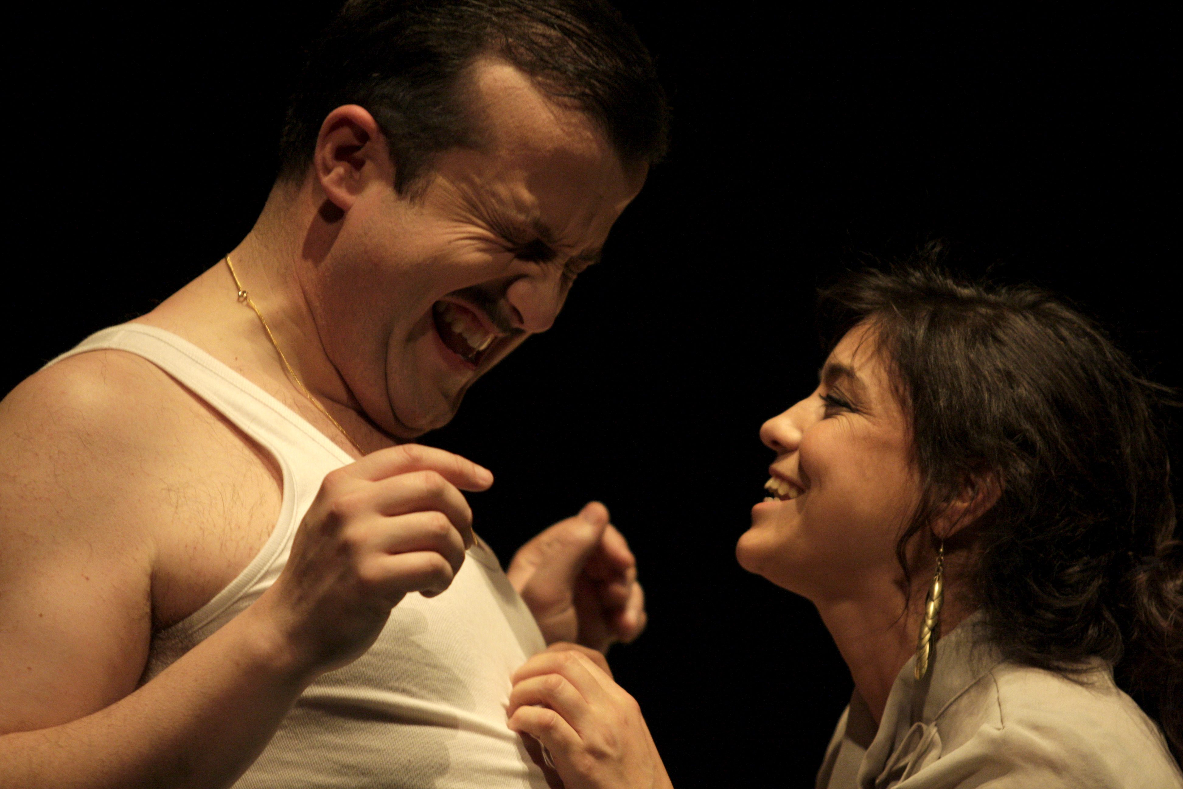 Imagen del espectáculo "F-23".